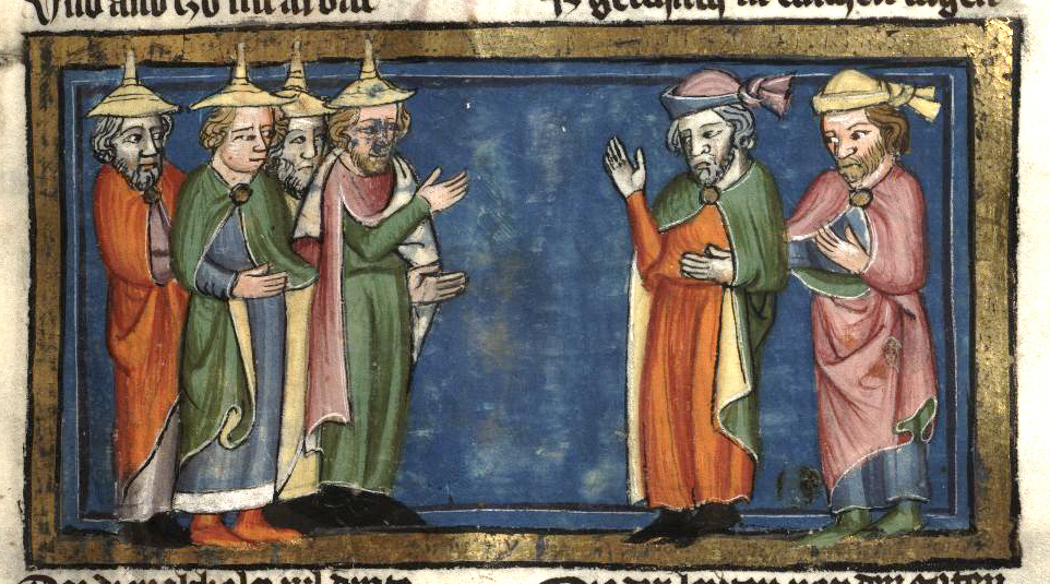 Rudolf von Ems: Weltchronik. Böhmen (Prag), 3. Viertel 14. Jahrhundert. Hochschul- und Landesbibliothek Fulda, Aa 88. Bildbeschreibung nach Martin Roland. Miniatur 106 183r Jotam erzählt die Baumfabel (?)